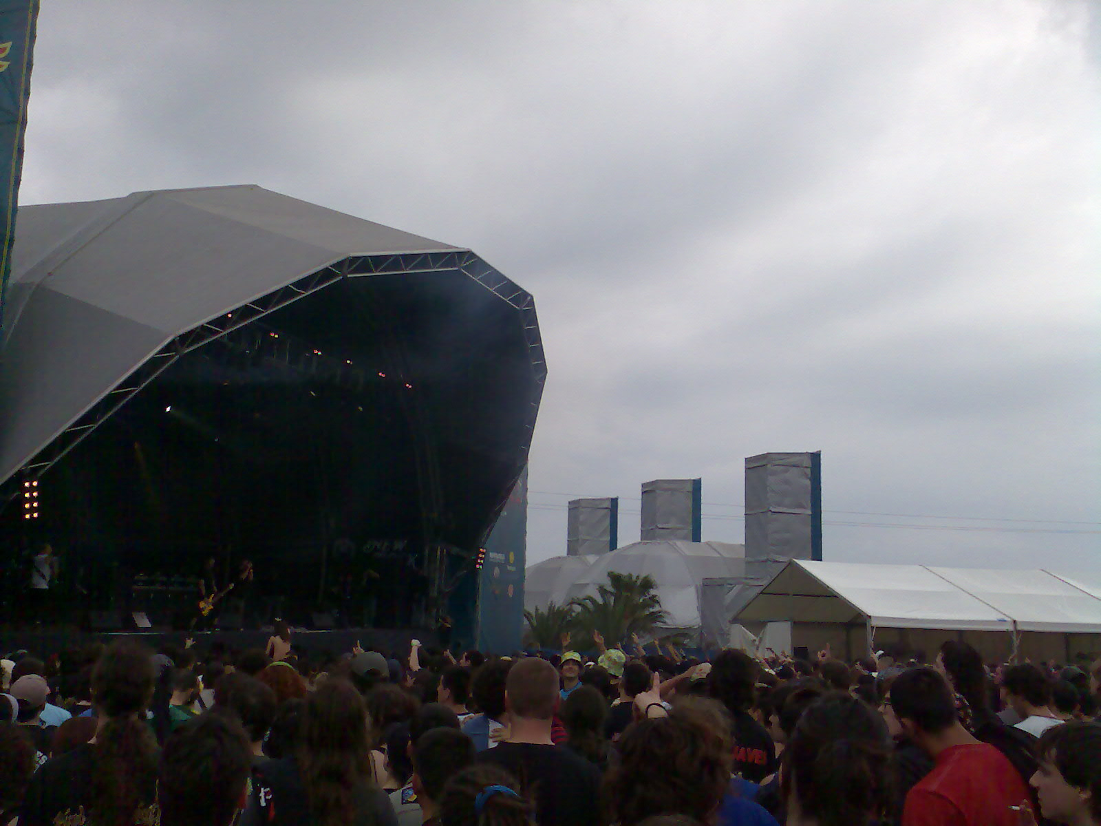 Viña Rock 2007; Primera edición en Benicasim (Castellón, España)